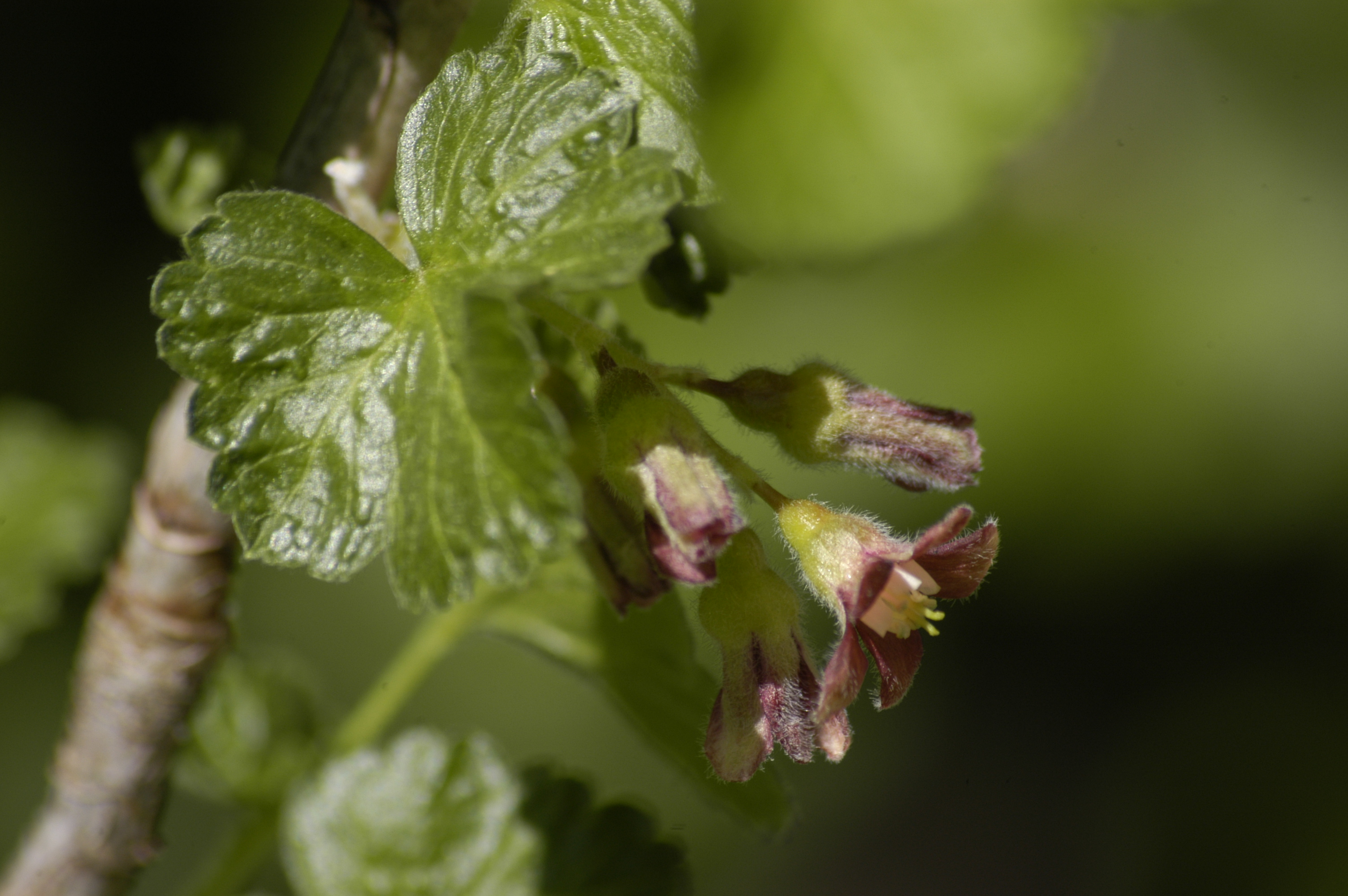 (en) Jostaberry (Ribes nidigrolaria), inflorescence (de) Jostabeere (Ribes nidigrolaria), Blütenstand Place/Ort: CH